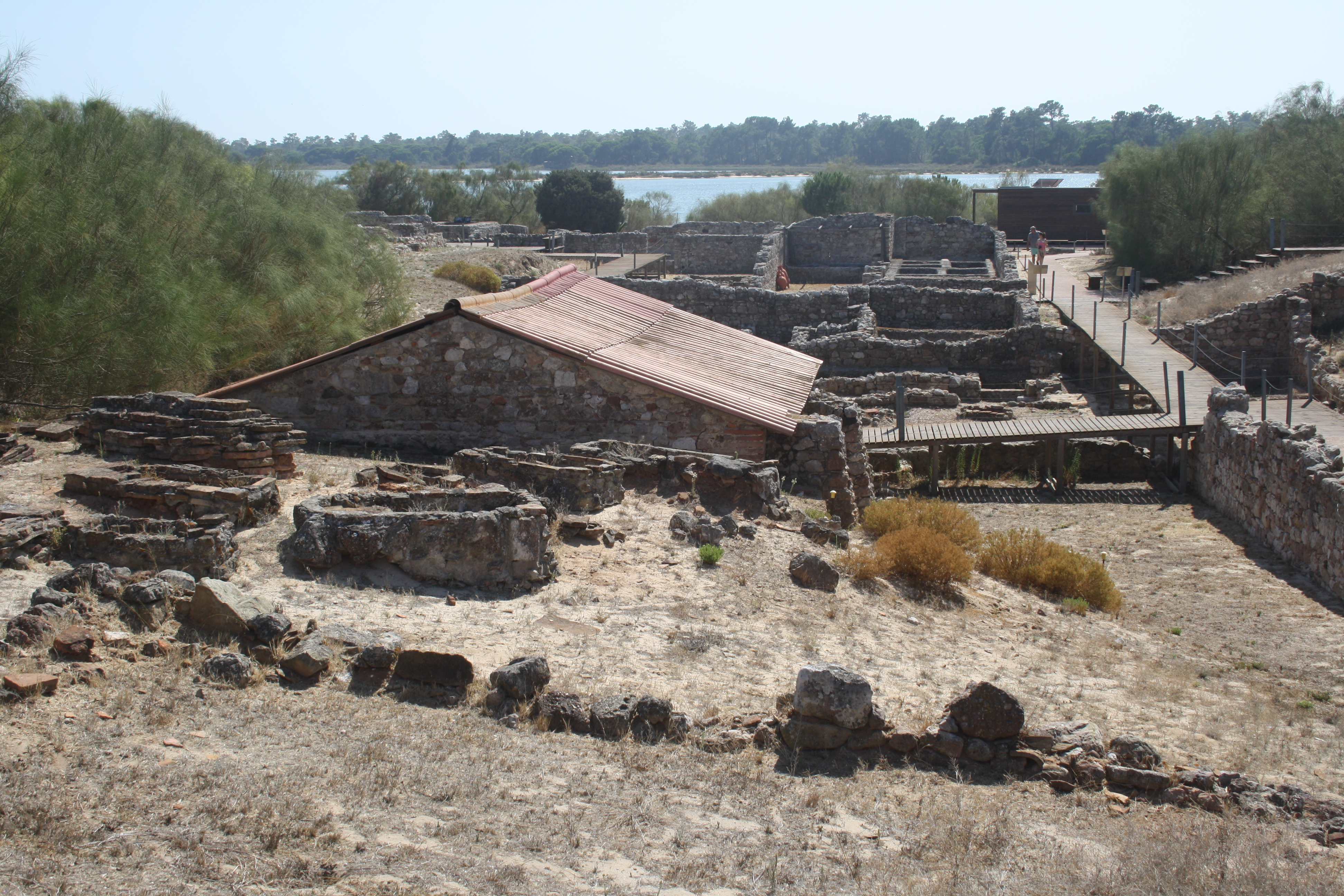 Begraafplaats, mausoleum en daarachter de viswerkplaats